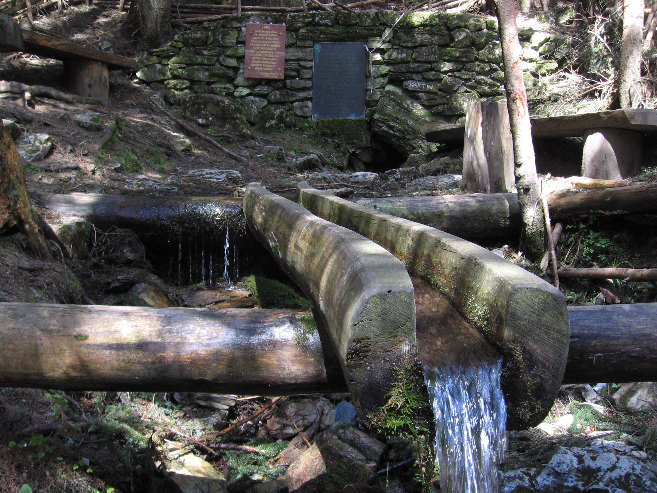 Raabquelle im Grazer Bergland